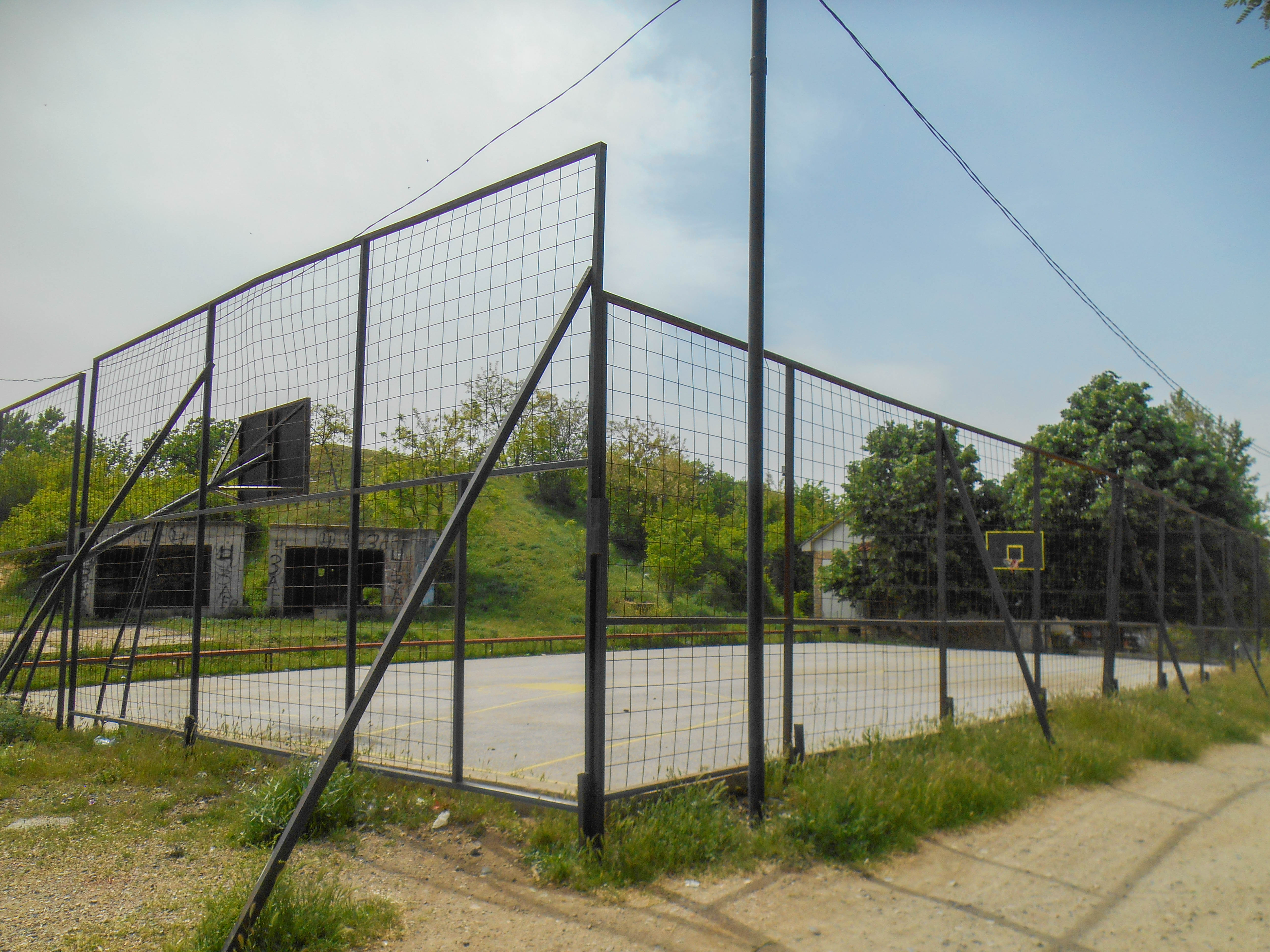 Спортско игралиште